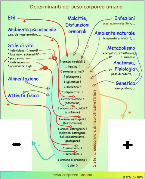 Determinanti del peso corporeo umano